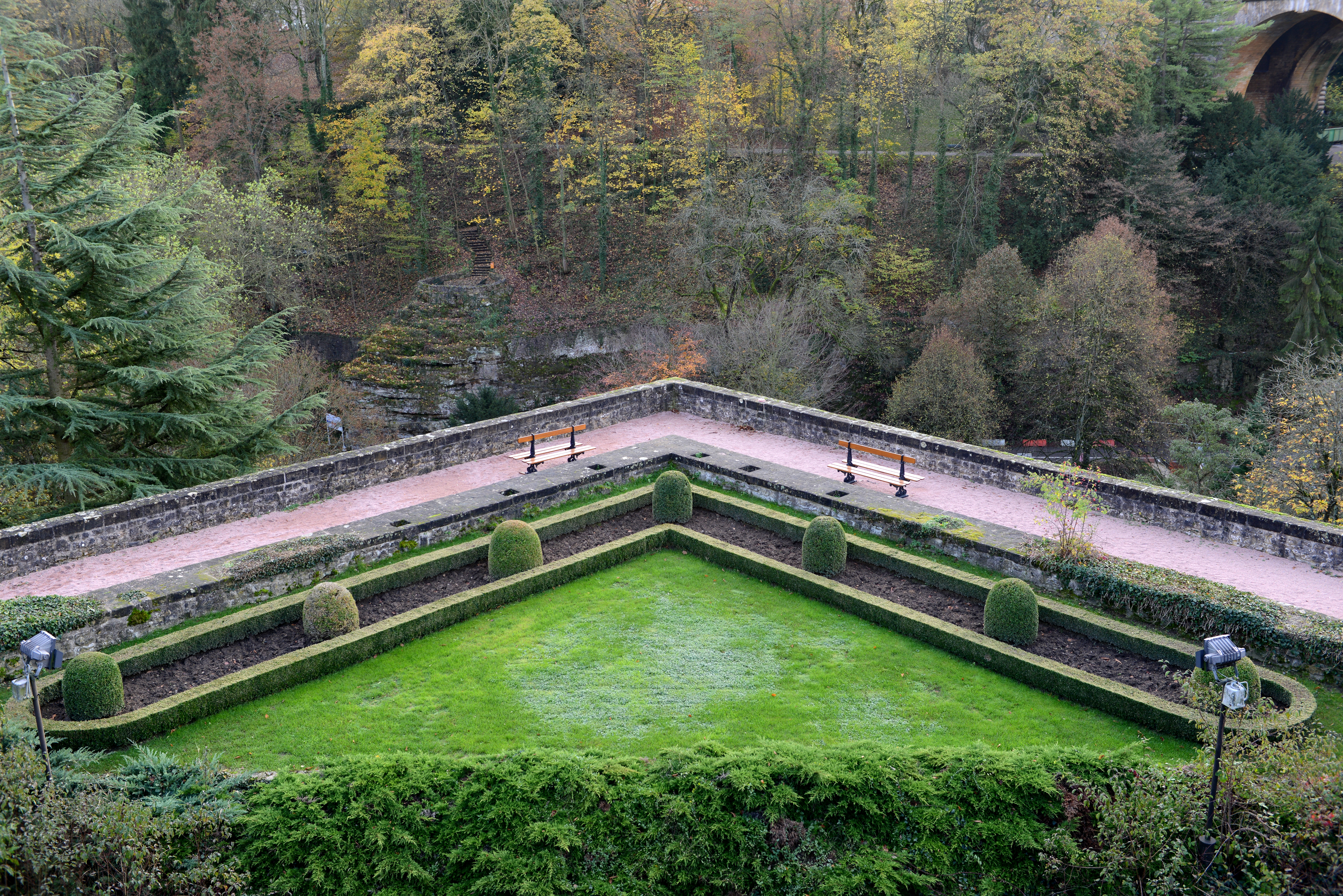 D'"Paschtéitchen", offziell de Ravelin Beck-Jost, ënner der Fausse braie Beck-Jost.